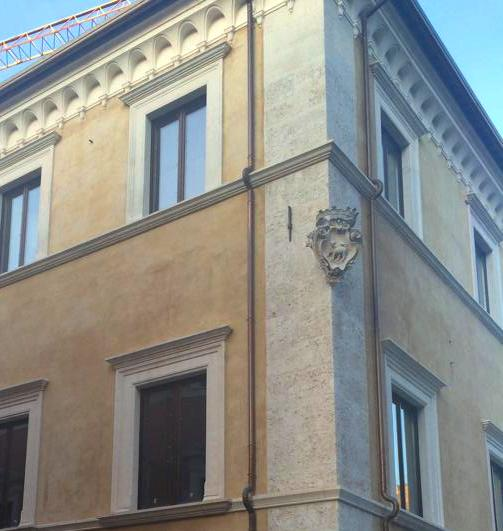 Particolare dello stemma della famiglia Bonanni (D’oro al gatto passante di nero con la testa in maestà) su palazzo Lucentini Bonanni, in L'Aquila.